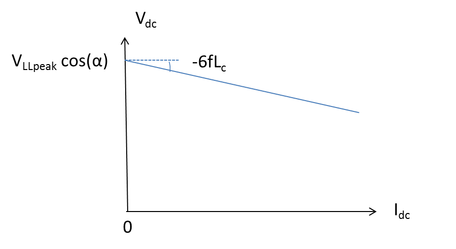 Illustration de l'équation liant tension continu et courant continu dans un redresseur.